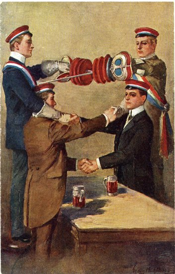 „Landesvater“